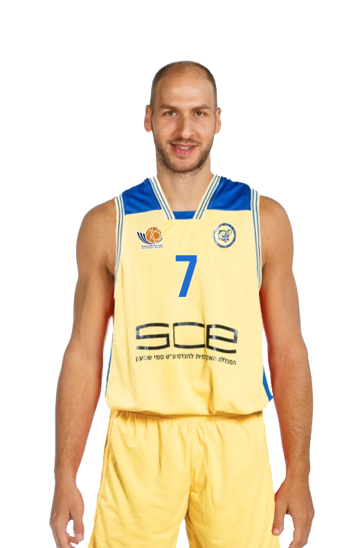 כדורסל מכבי אשדוד